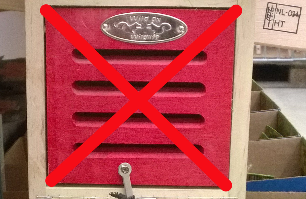 Viel zu klein für einen Florfliegenkasten, siehe